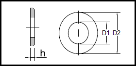 ISO 7090